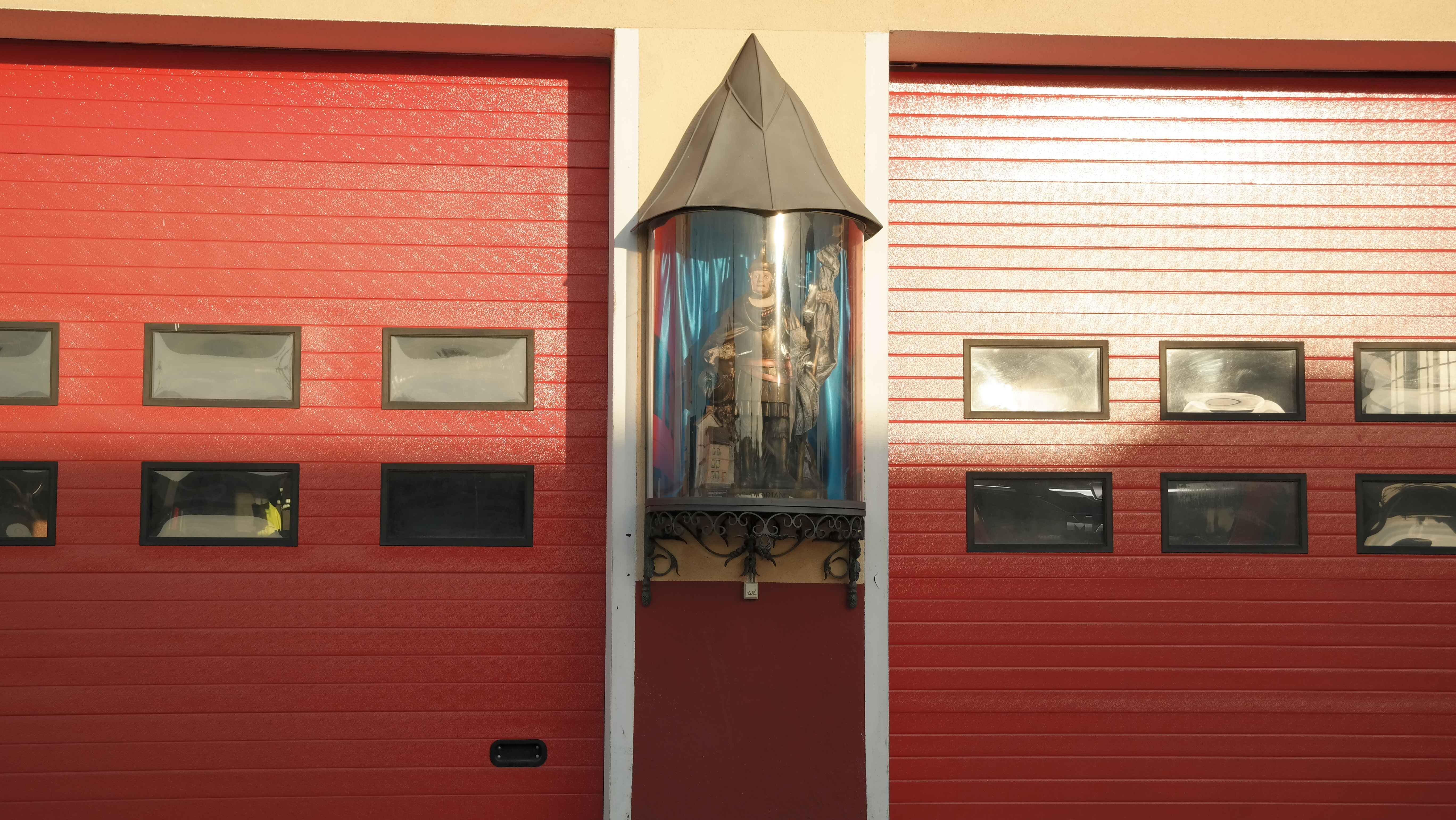 Jedna z kapliczek w Somoninie, która zawieszona jest na ścianie budynku OSP, przedstawiająca świętego Floriana.